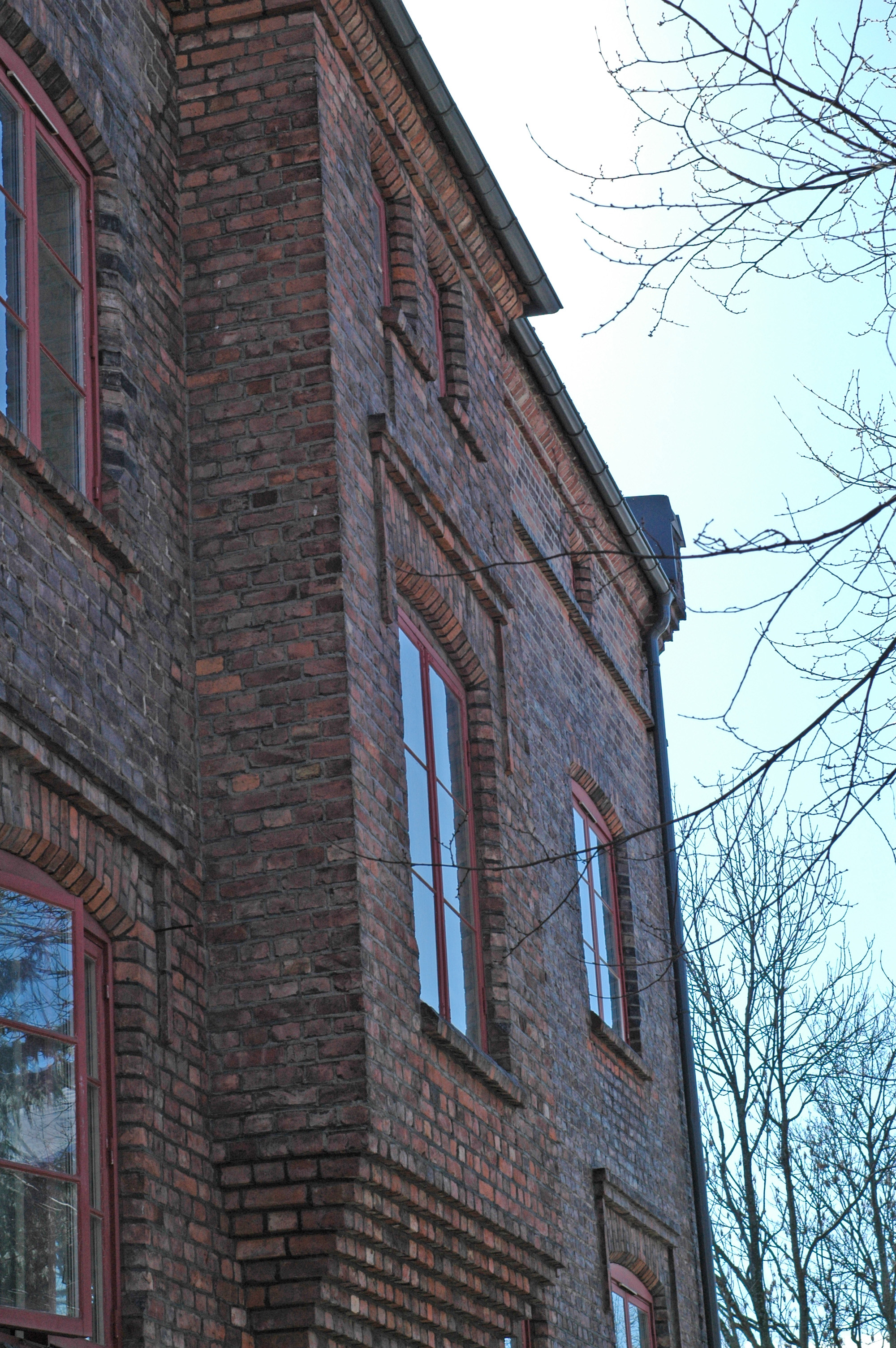 Tidligere Sagene brannstasjon i Sagveien 23D, Sagene i Oslo